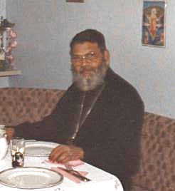 Bishop Geevarghese Mar Timotheos Chundevalel from Tiruvalla (* 1928)